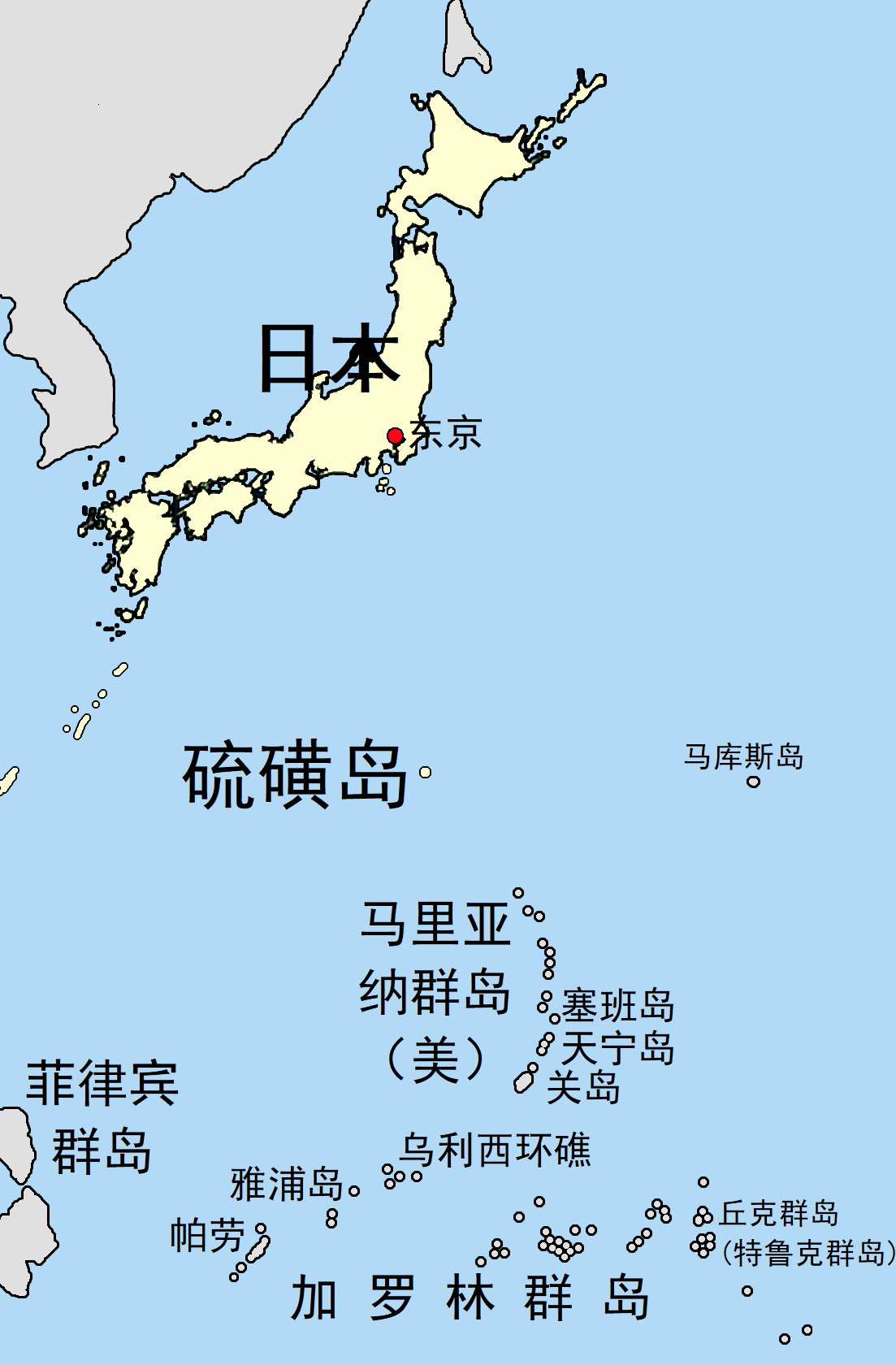 硫磺岛地图